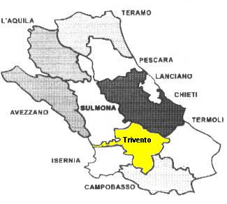 Trivento